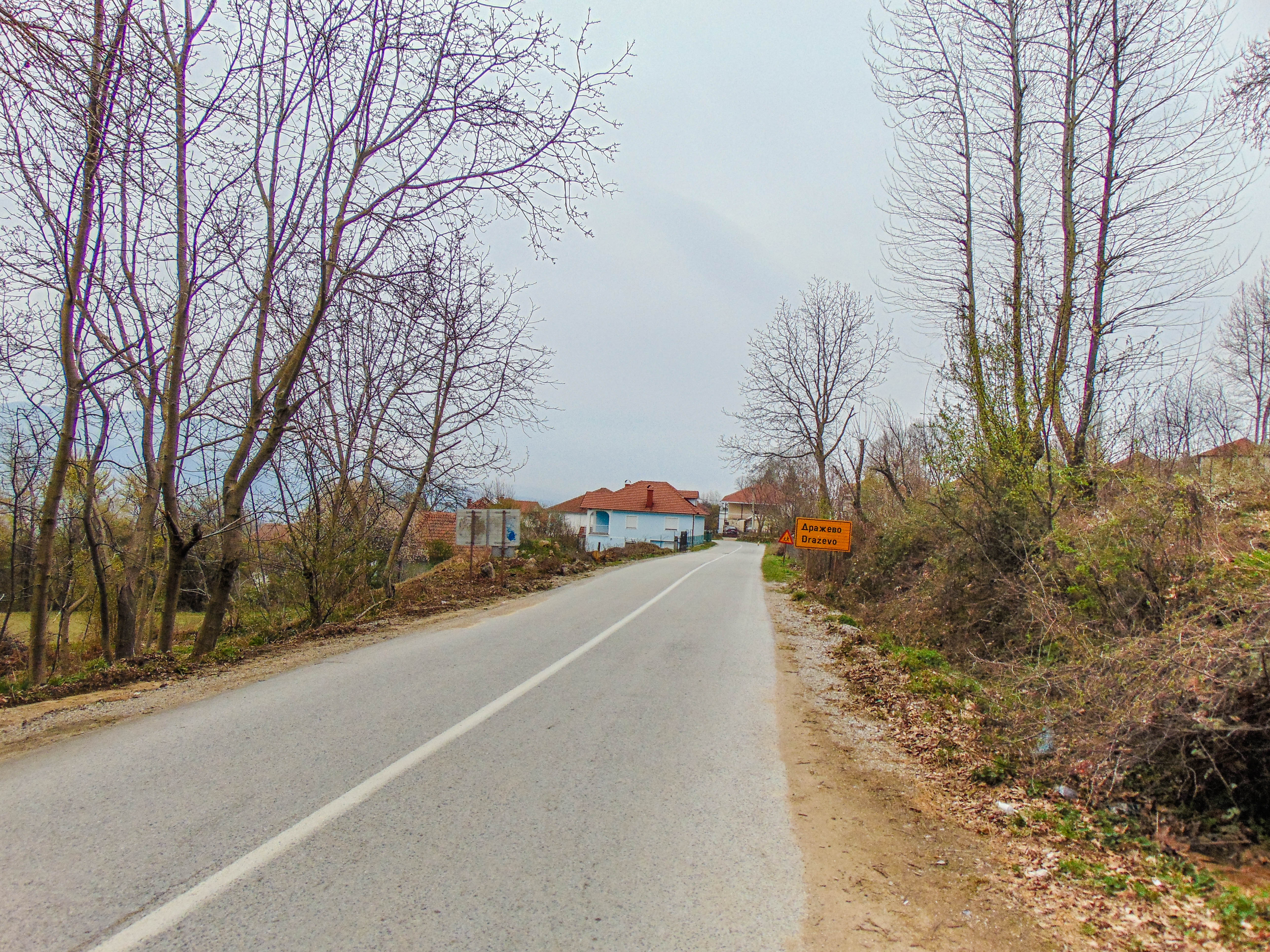 Дражево